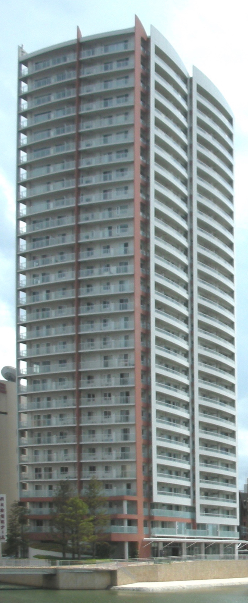 小倉タワー。撮影者：User:Wiki591801。